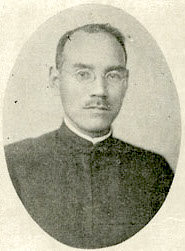 Sugimoto Ryō (杉本良)